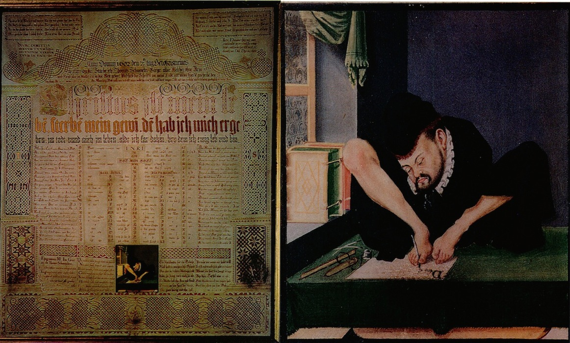 Ausschnitt aus der Gedenktafel des ohne Arme geborenen Stadtschreibers und Kalligraphen Thomas Schweickert (1540/41-1602) (St. Michael, Schwäbisch Hall).